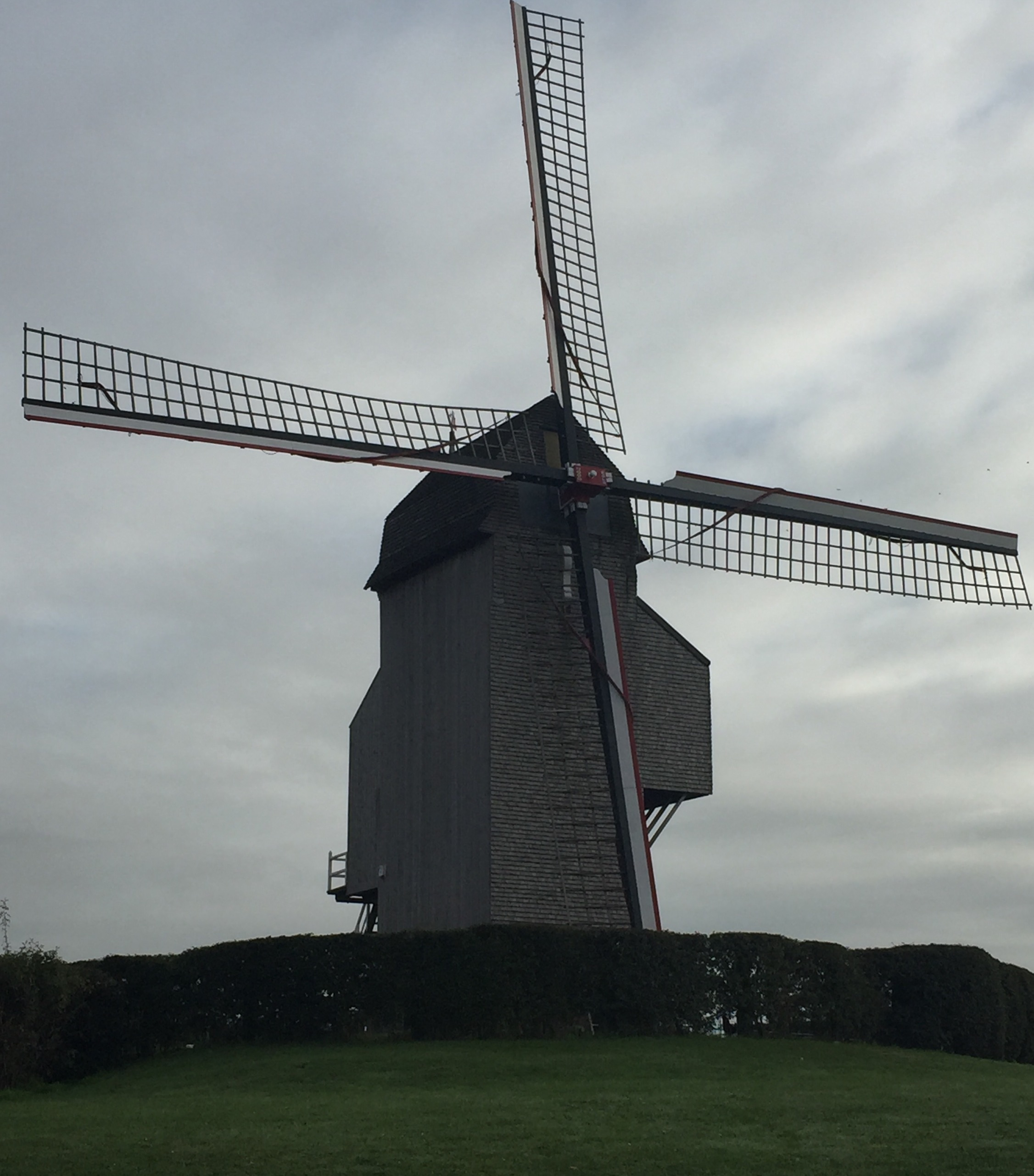 Moulin Soete, situé le long de la RN58 à Comines